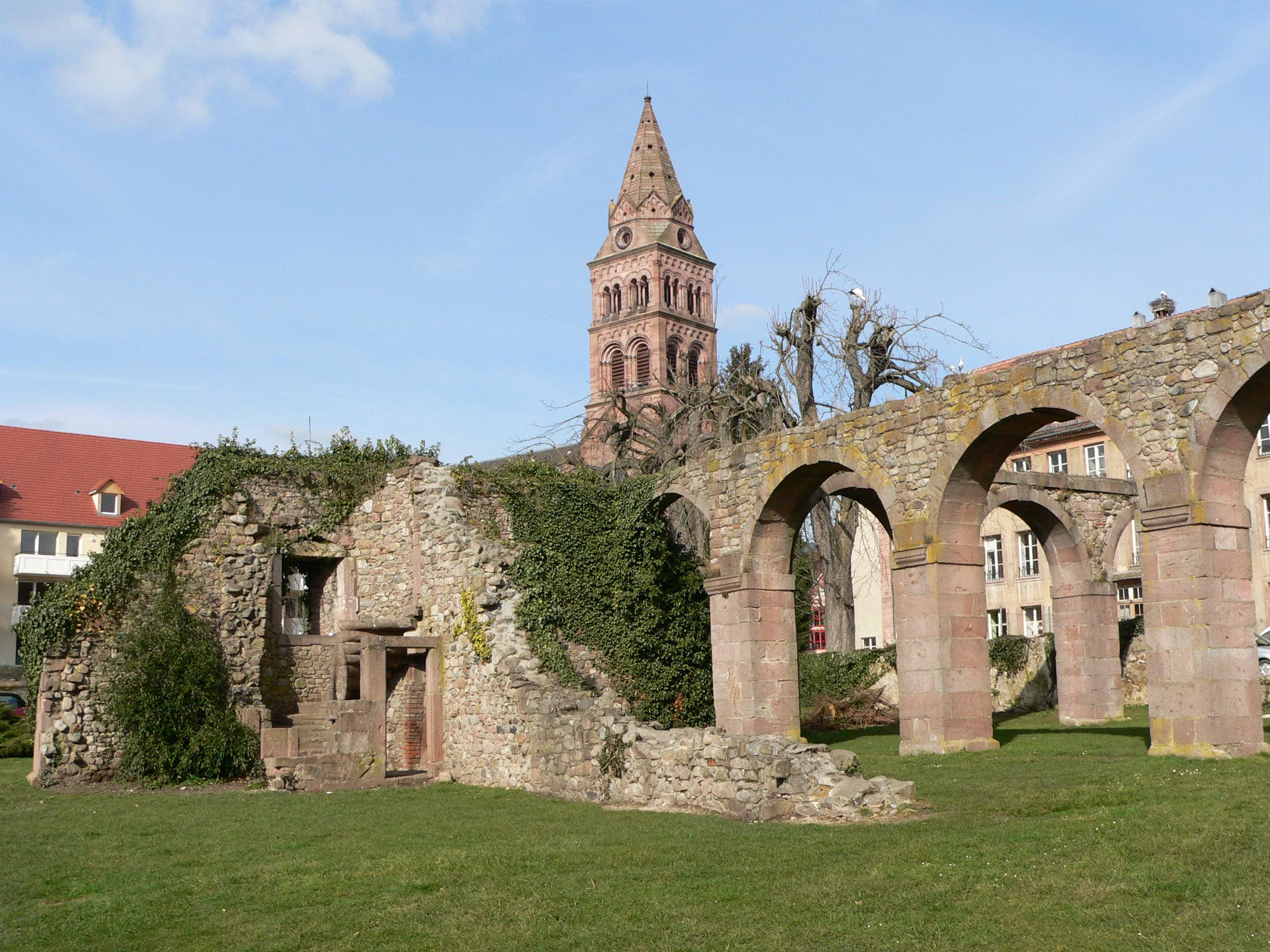 Ruines de l'abbaye de Munster. Au fond l'église protestante.